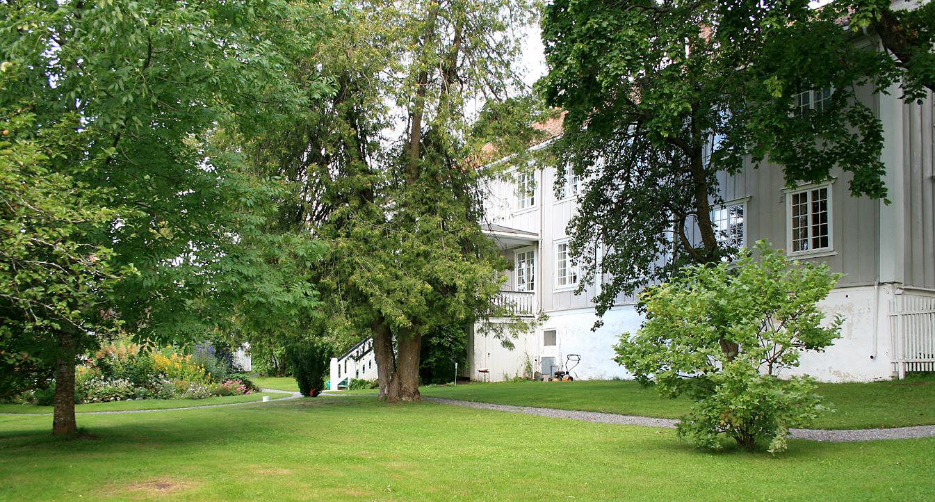 Hoff prestegard, Østre Toten. Freda.